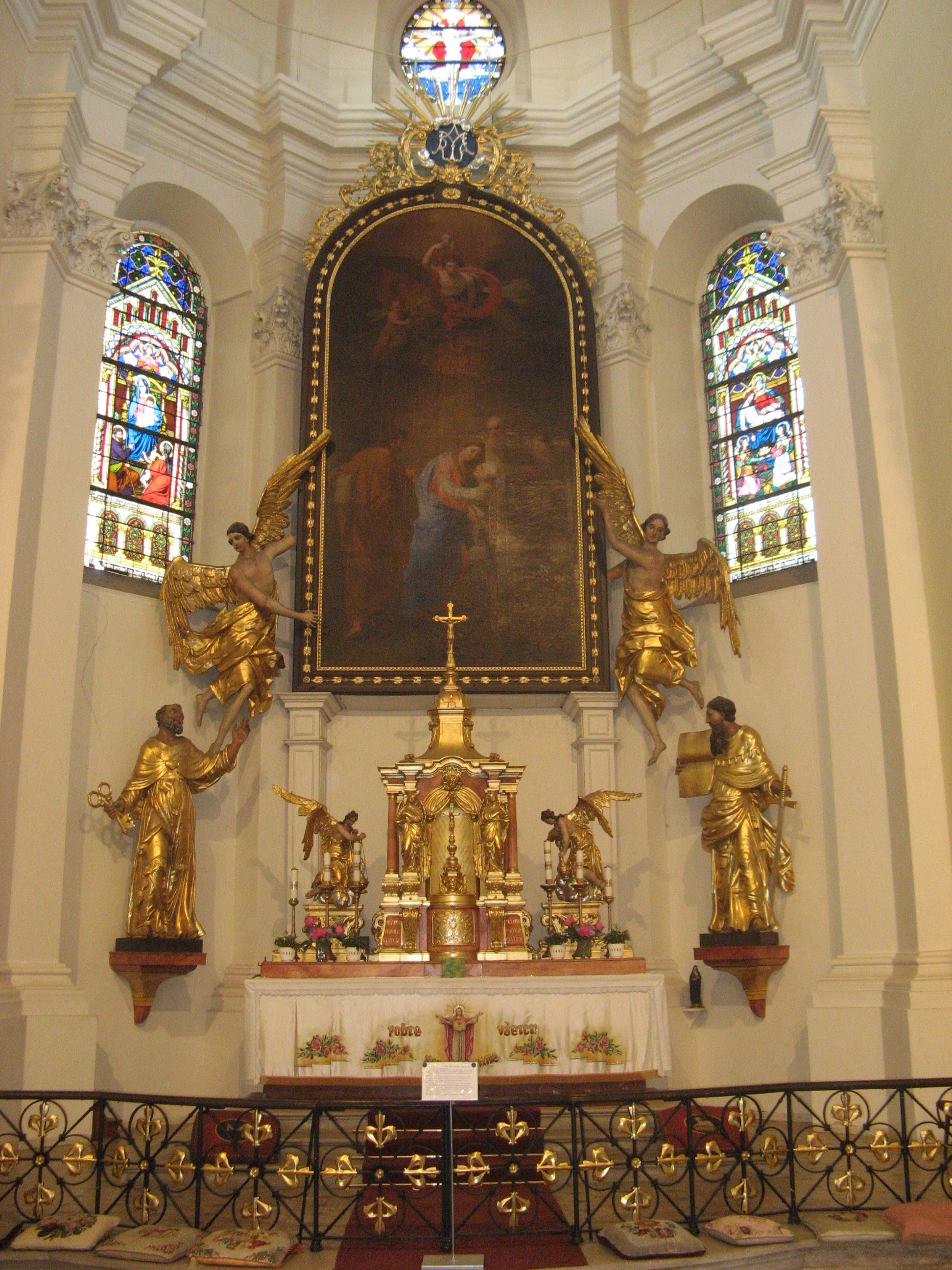 Vnitřek kostela Navštívení Panny Marie ve Svitavách